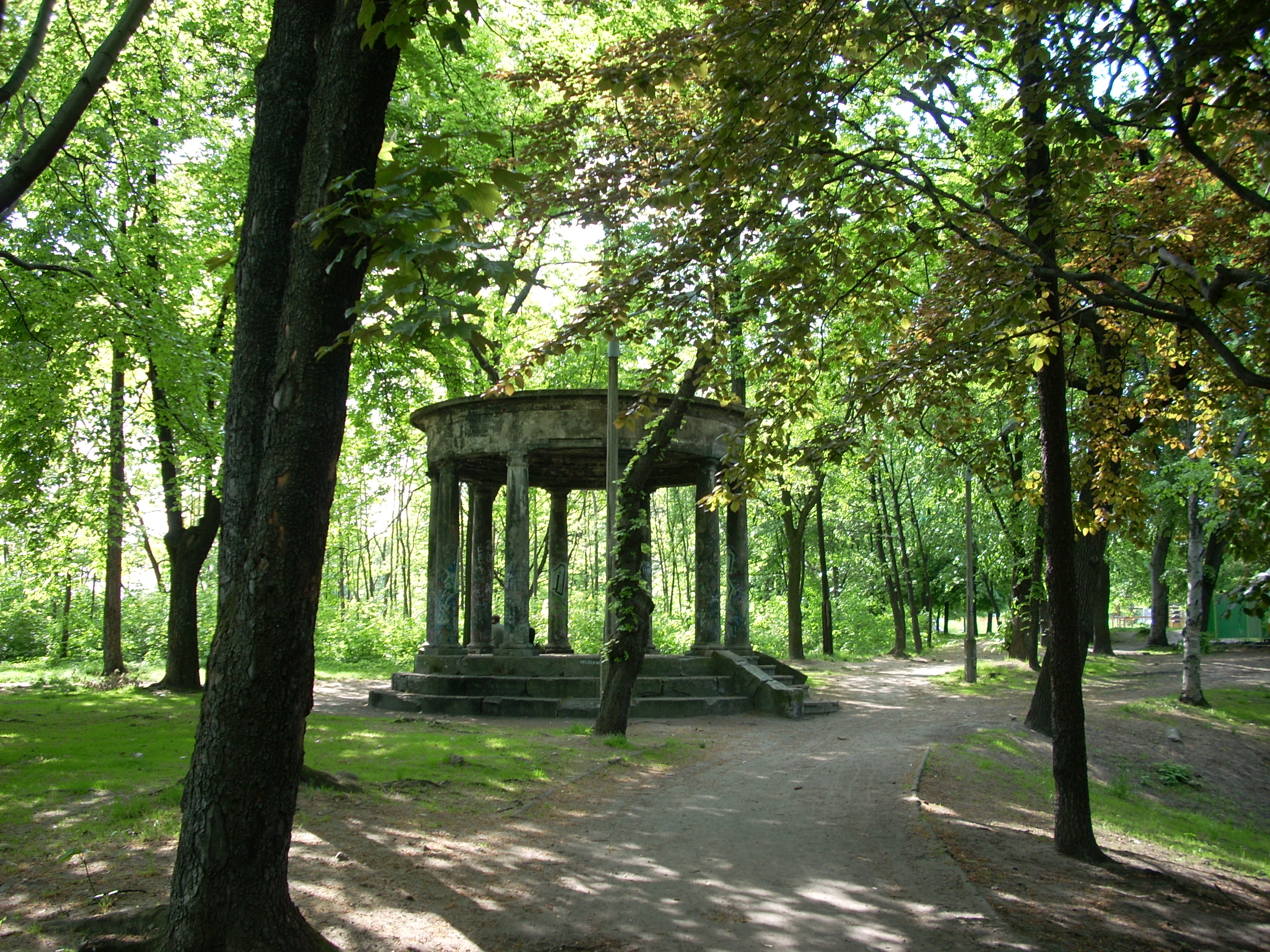 Świątynia dumania w parku Żeromskiego w Sosnowcu.(zwana także świątynią Sybilli)